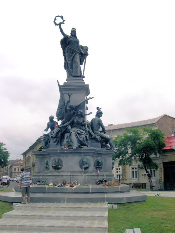 Szabadság-szobor, Arad (Románia)